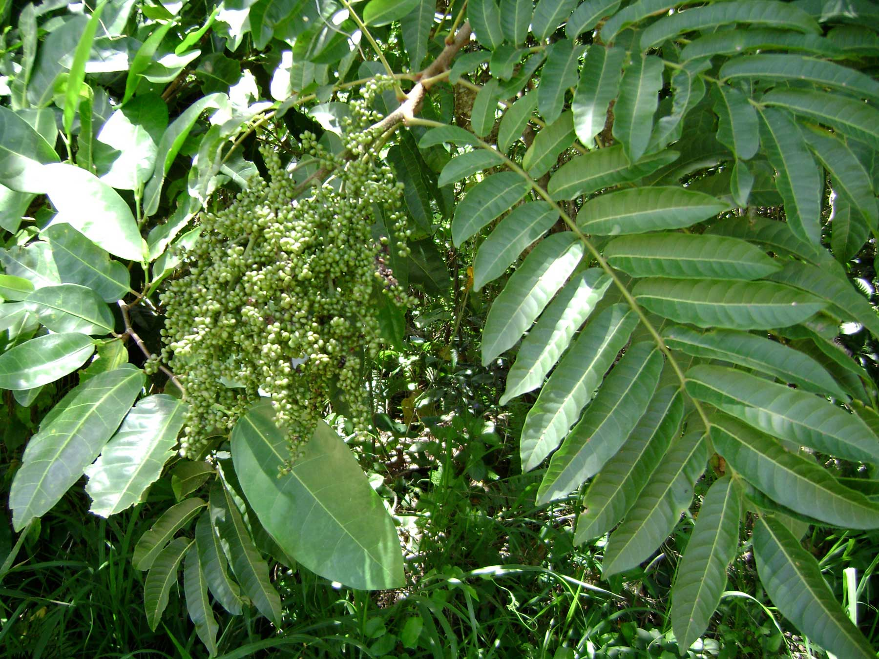 Rhus taitensis, fruiting; (tavahi) in Tongatapu